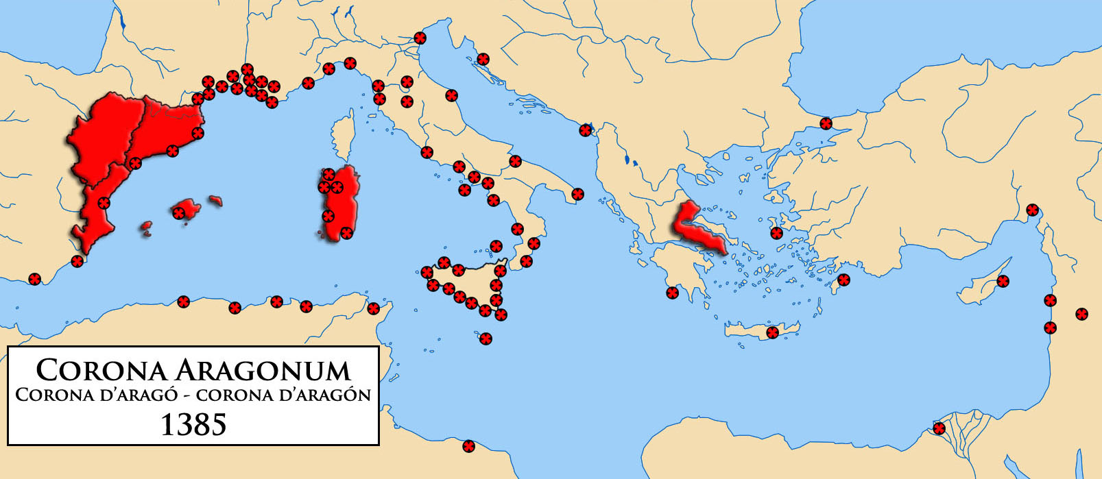 corona aragonum - corona d'aragón - corona d'aragó